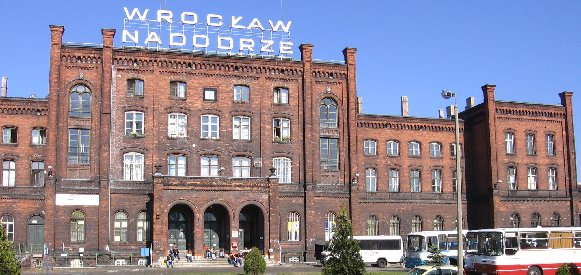 Wrocław, Poland: secondary railway station Wrocław-Nadodrze